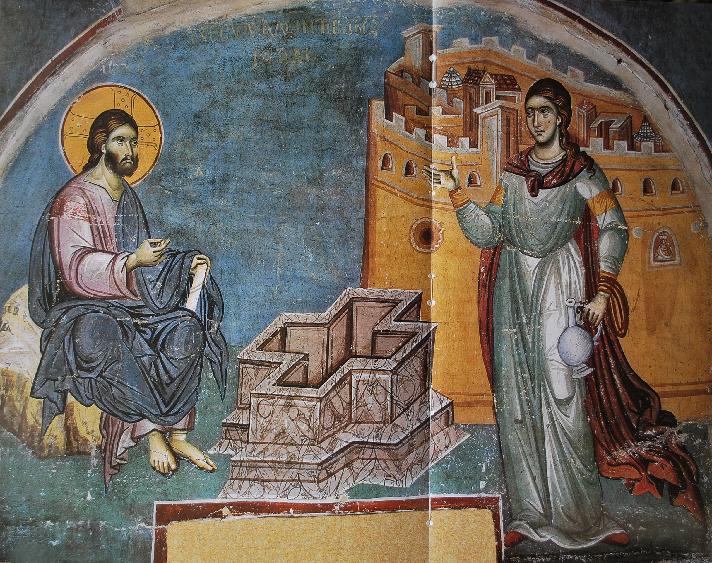 Фотина Самаряныня в Протате